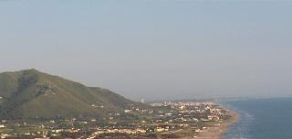 Baia Felice